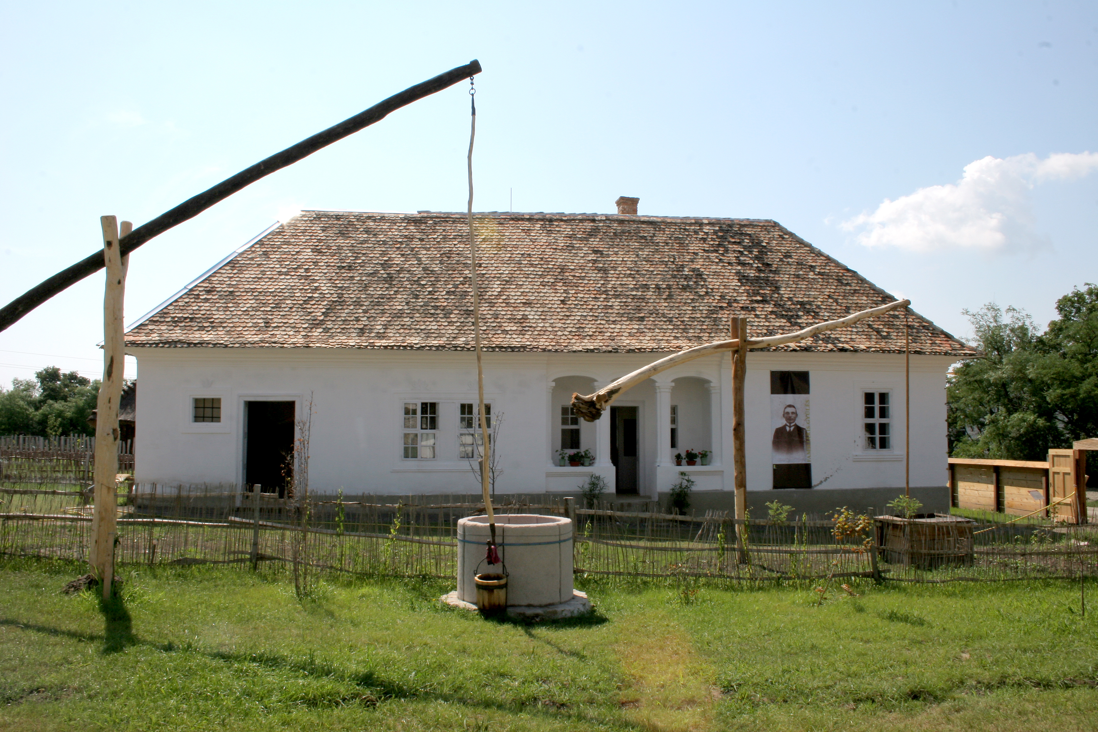 Skanzen, Észak-Magyarország tájegység, Nemesradnóti porta